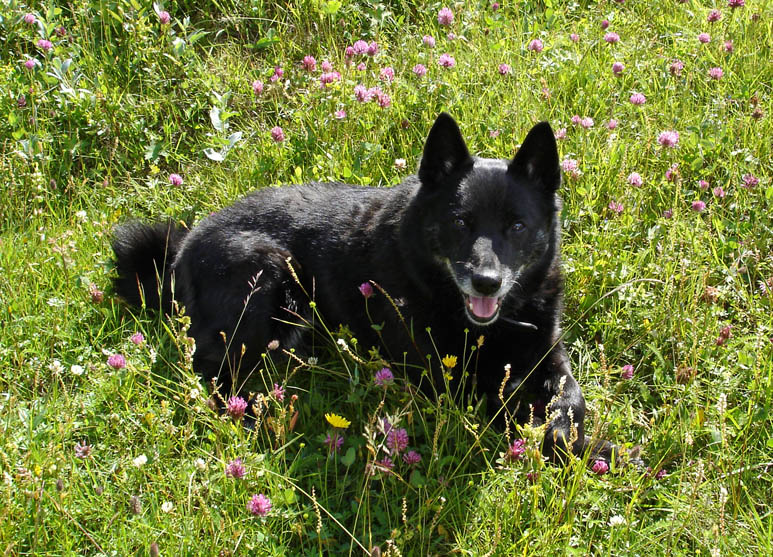 svart buhund